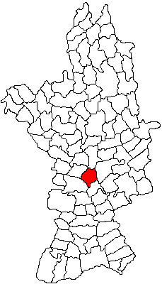 Categorie:Hărţi ale judeţului Olt